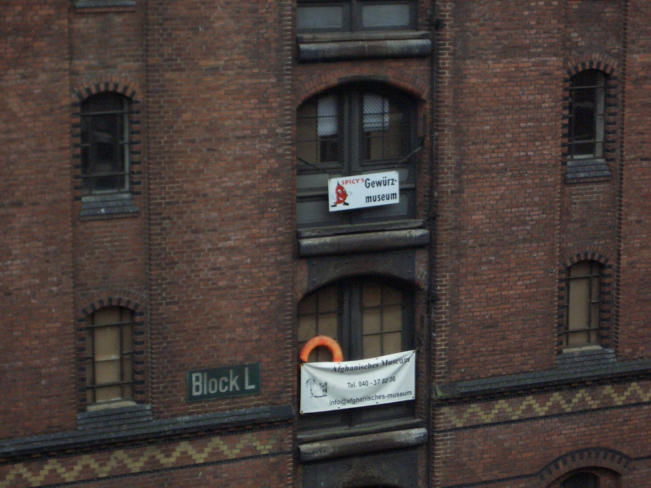 Der historische Speicher am Sandtorkai, Heimat des Afghanischen Museums Hamburg und des Gewürzmuseums